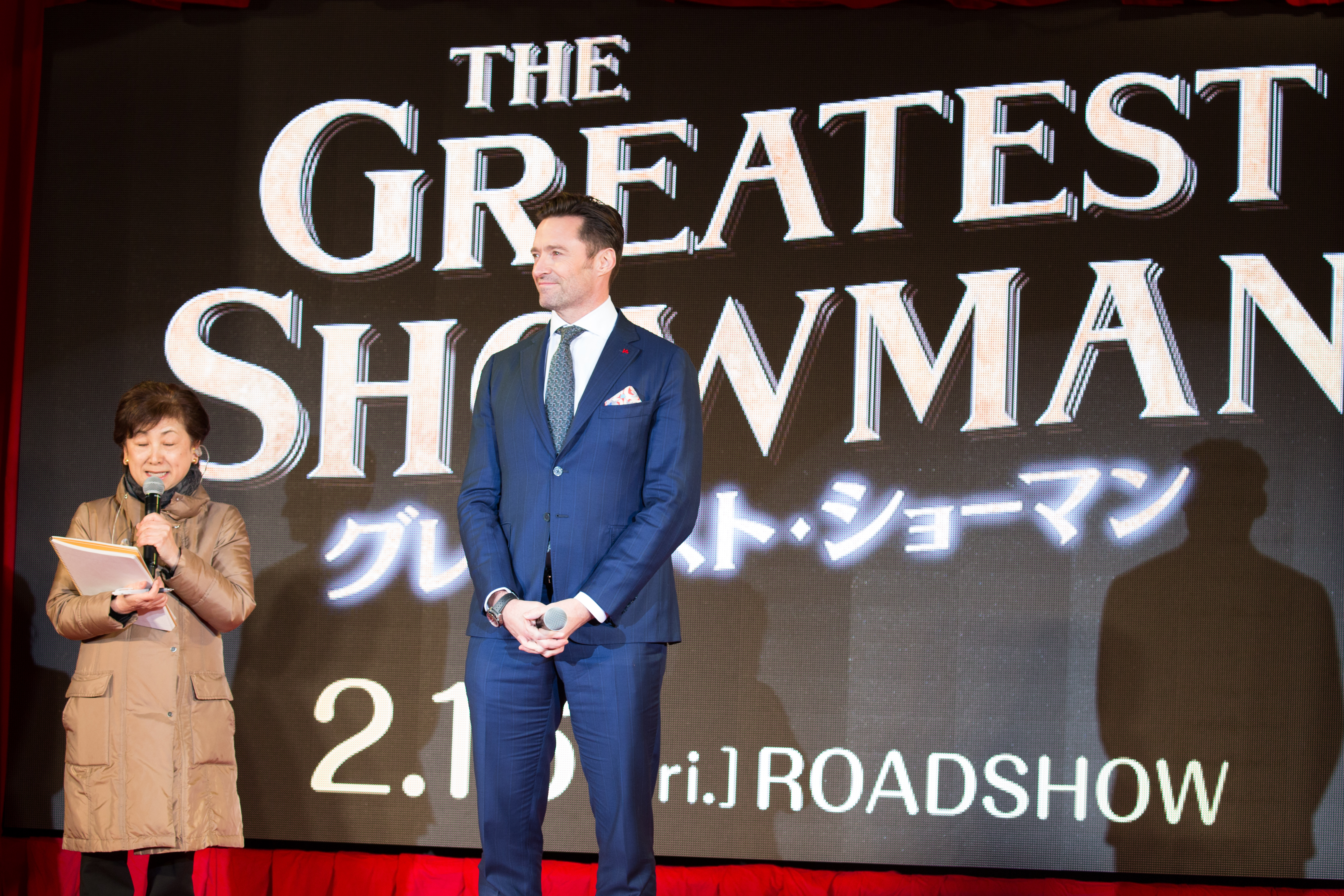 グレイテスト・ショーマン ジャパン・プレミア レッドカーペット ヒュー・ジャックマン